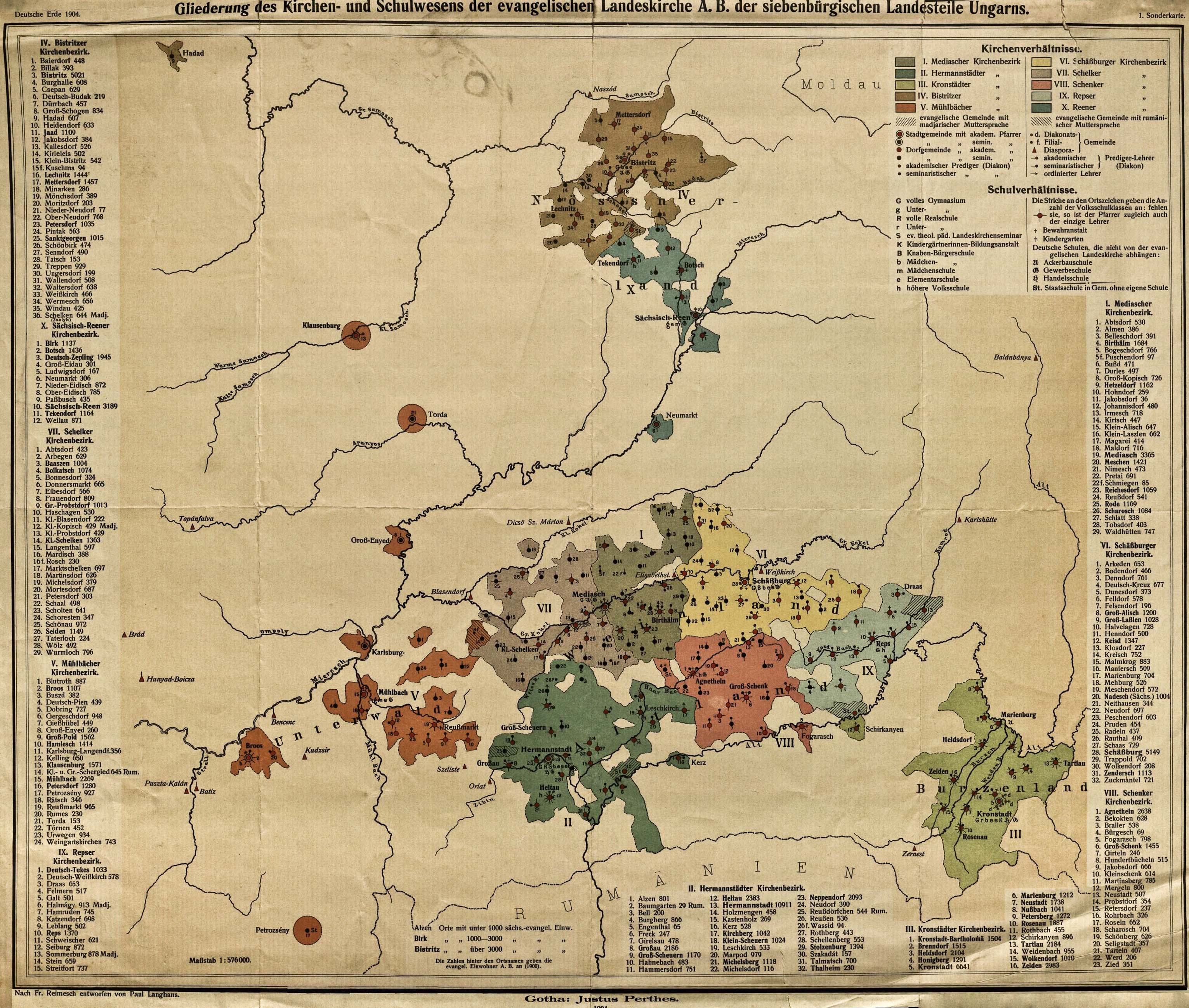 Gliederung des Kirchen- und Schulwesens der evangelischen Landeskirche A.B. der siebenbürgischen Landesteile Ungarns.